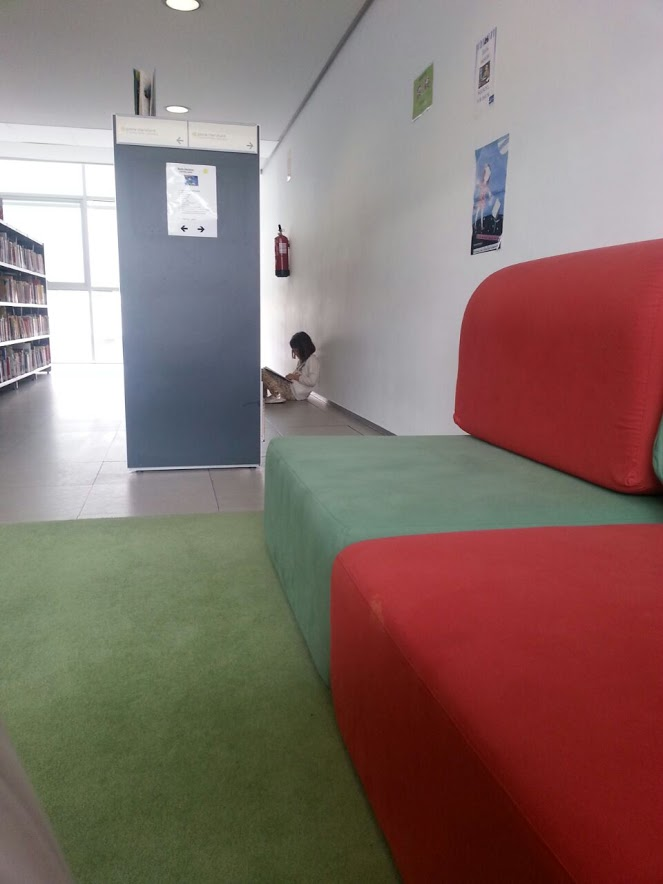 Neska bat liburu bat irakurtzen Leioako liburutegi publikoan.